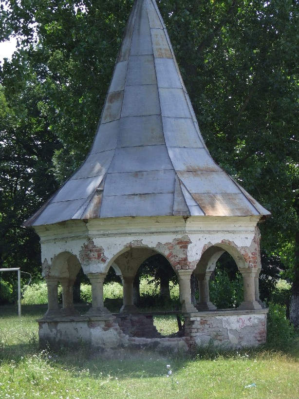 Kornis Castle in Mănăstirea, Cluj County, Romania